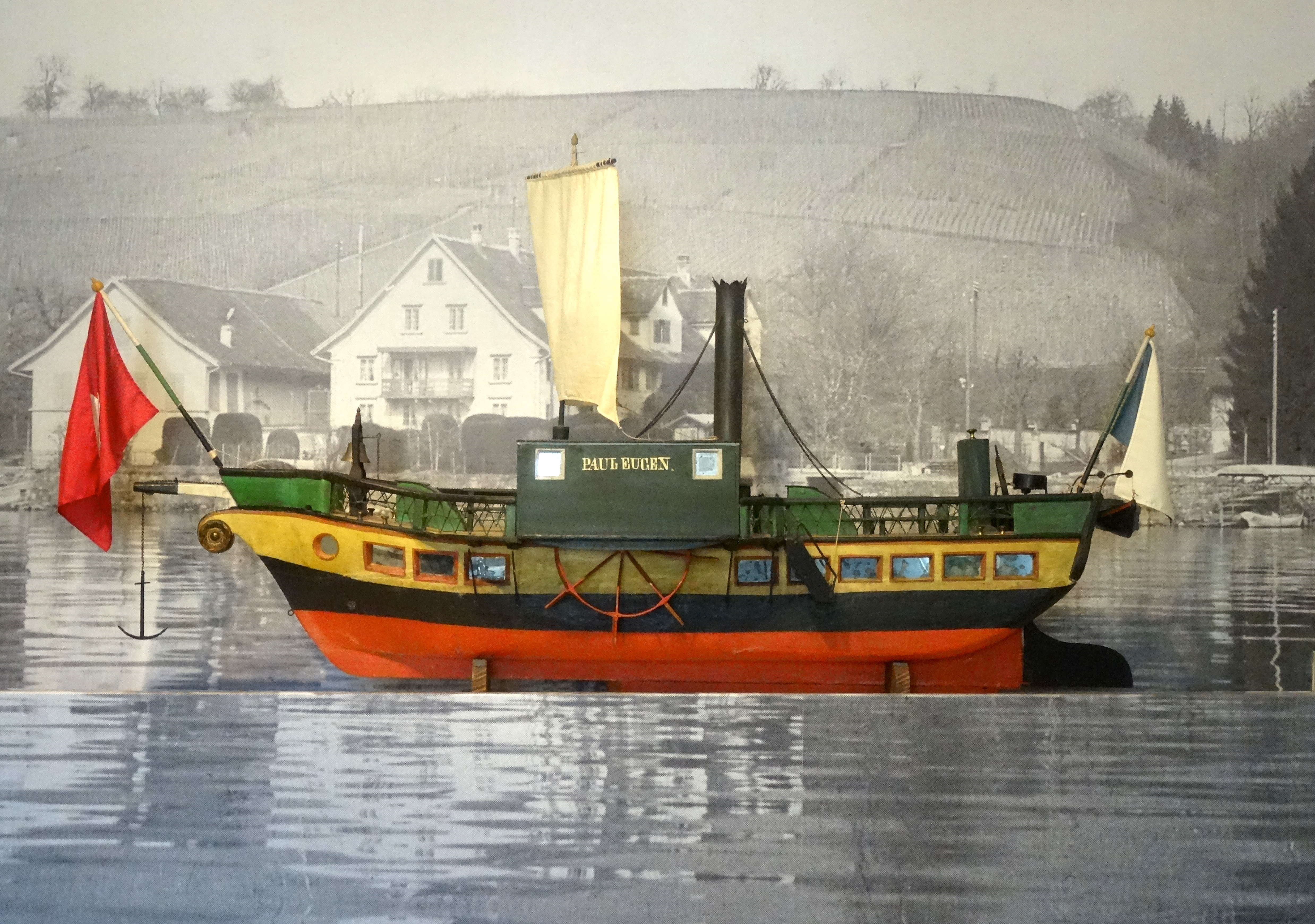 Modellschiff nach dem Raddampfer «Gustav Albert» 1847. Erbaut 1861 von Johann Rudolf Bleuler für seinen Sohn Eugen Bleuler